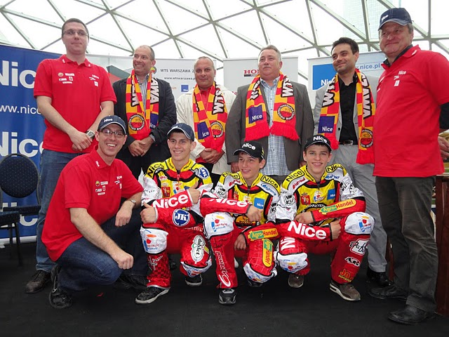 Drużyna WTS Warszawa na prezentacji w Zlotych Tarasach